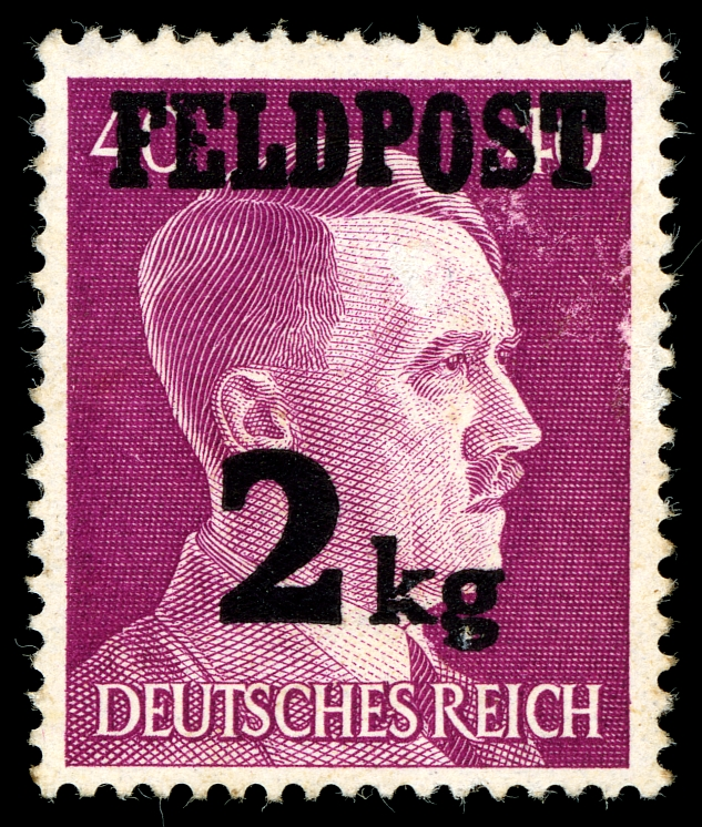 Ausgabepreis: Pfennig First Day of Issue / Erstausgabetag: Auflage: Entwurf: Druckverfahren: Michel-Katalog-Nr: Ländercode-MiNr